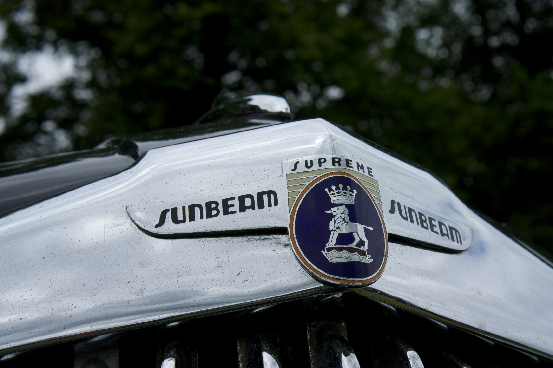 Sunbeam grille badge